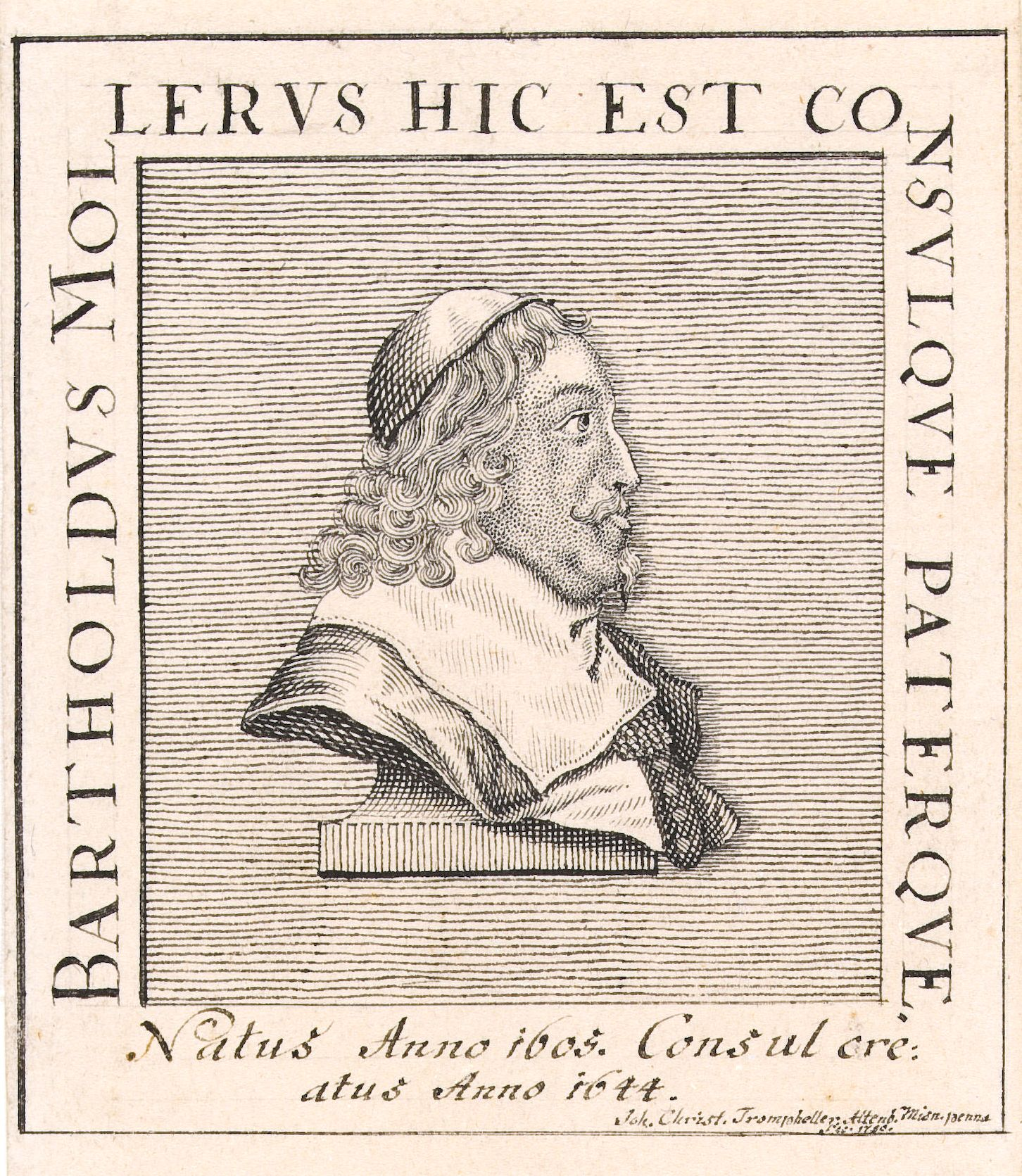 Bartholdvs Mollervs Hic Est Consvlqve Paterqve